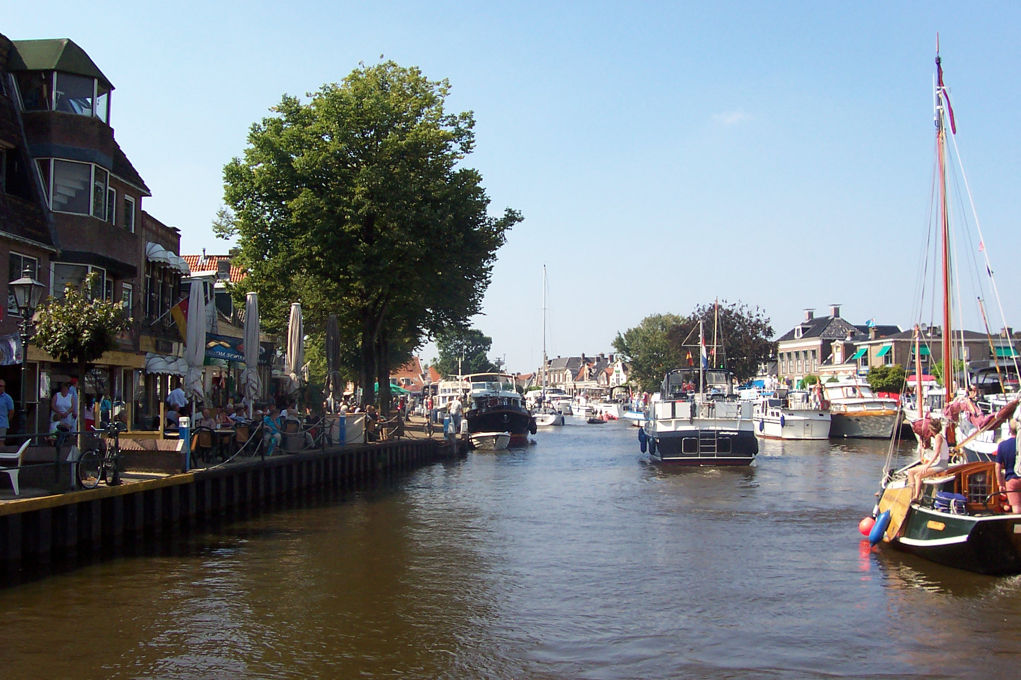 De Lemmer simmerdeis: Sawol op strjitte as op it wetter tilt it op fan de benammen Dútske toeristen